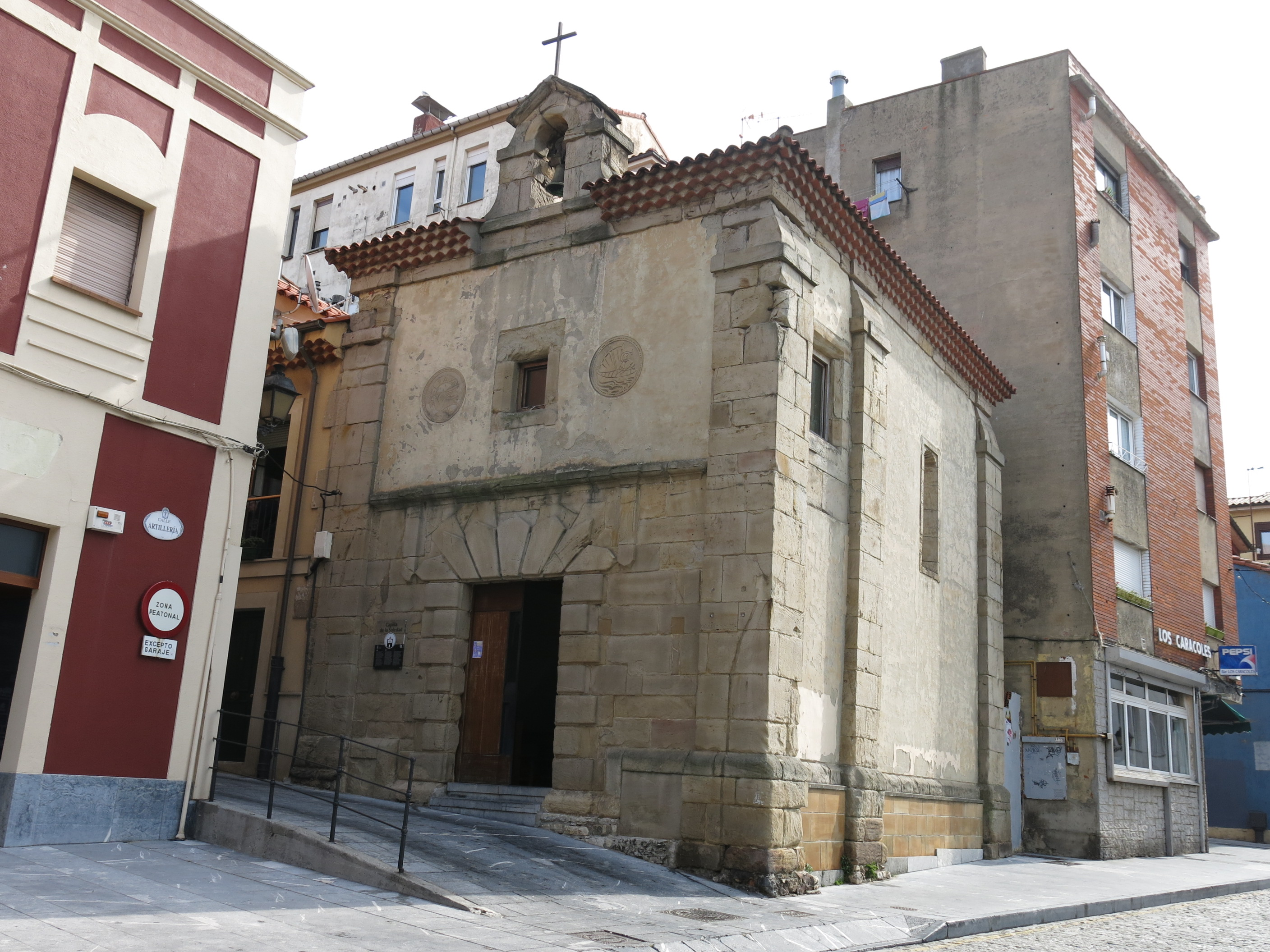 Conjunto Histórico Artístico El Barrio Viejo de Gijón